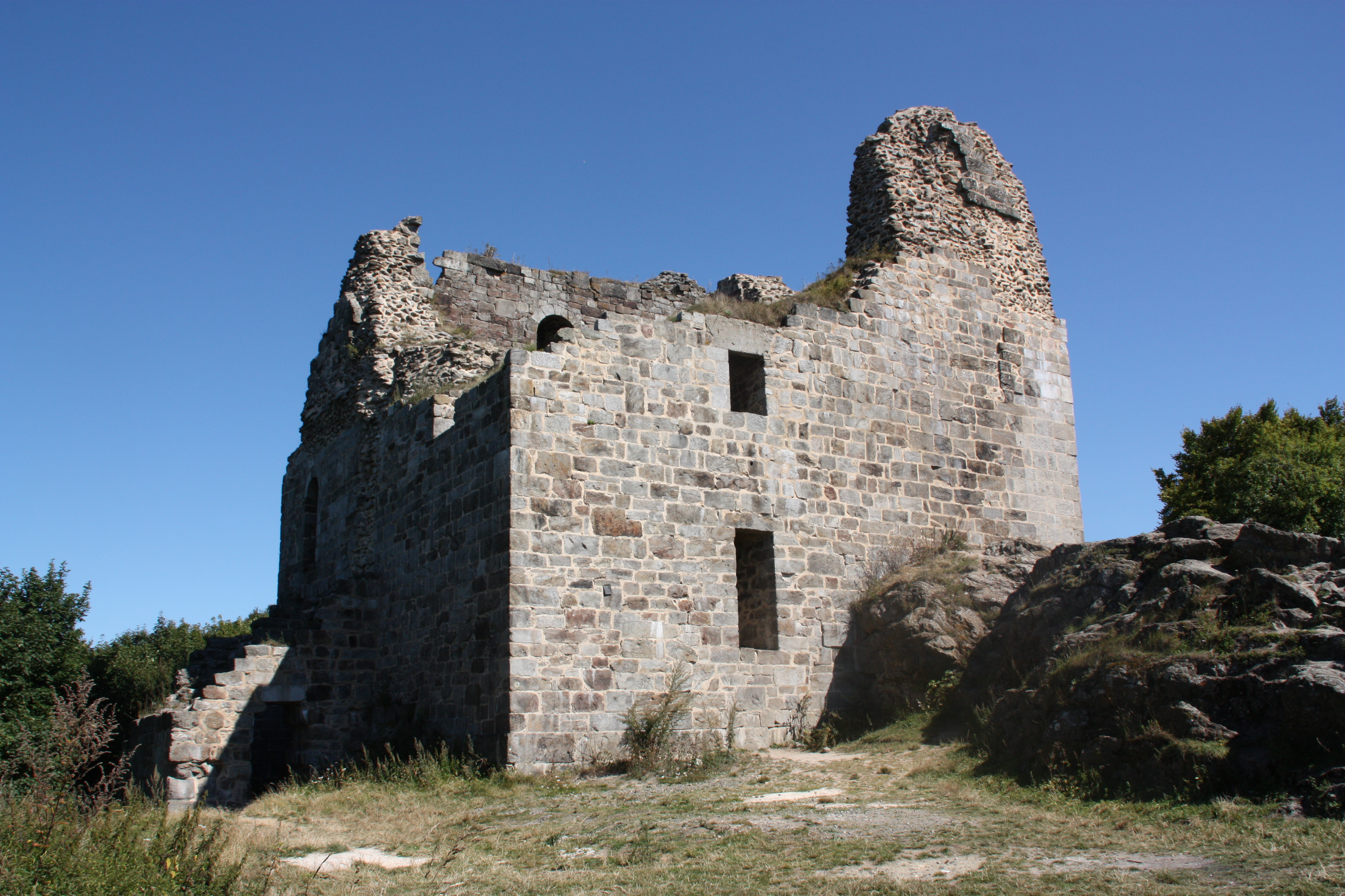 Burg Přimda, Westböhmen, Tschechische Republik. Gesamtansicht von Süden.